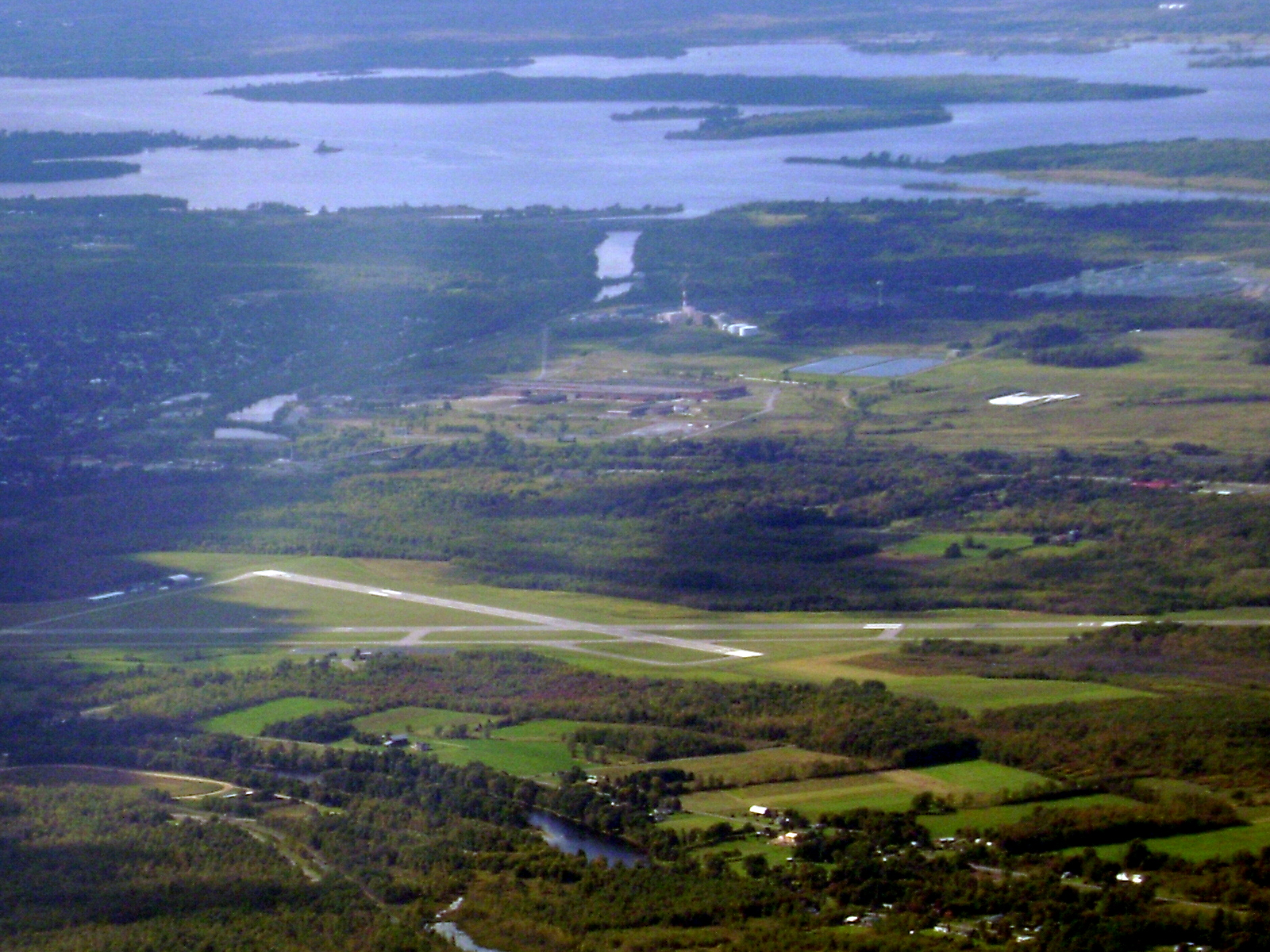 Massena Airport (KMSS), Massena, NY, USA